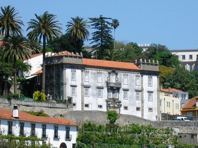 "Casa das Sereias" / Palácio das Sereias in Porto, Portugal